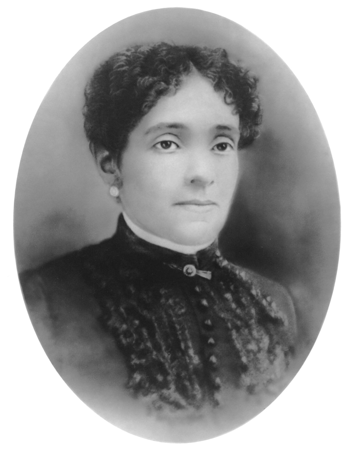 Eliza Bryant (1827-May 13, 1907)